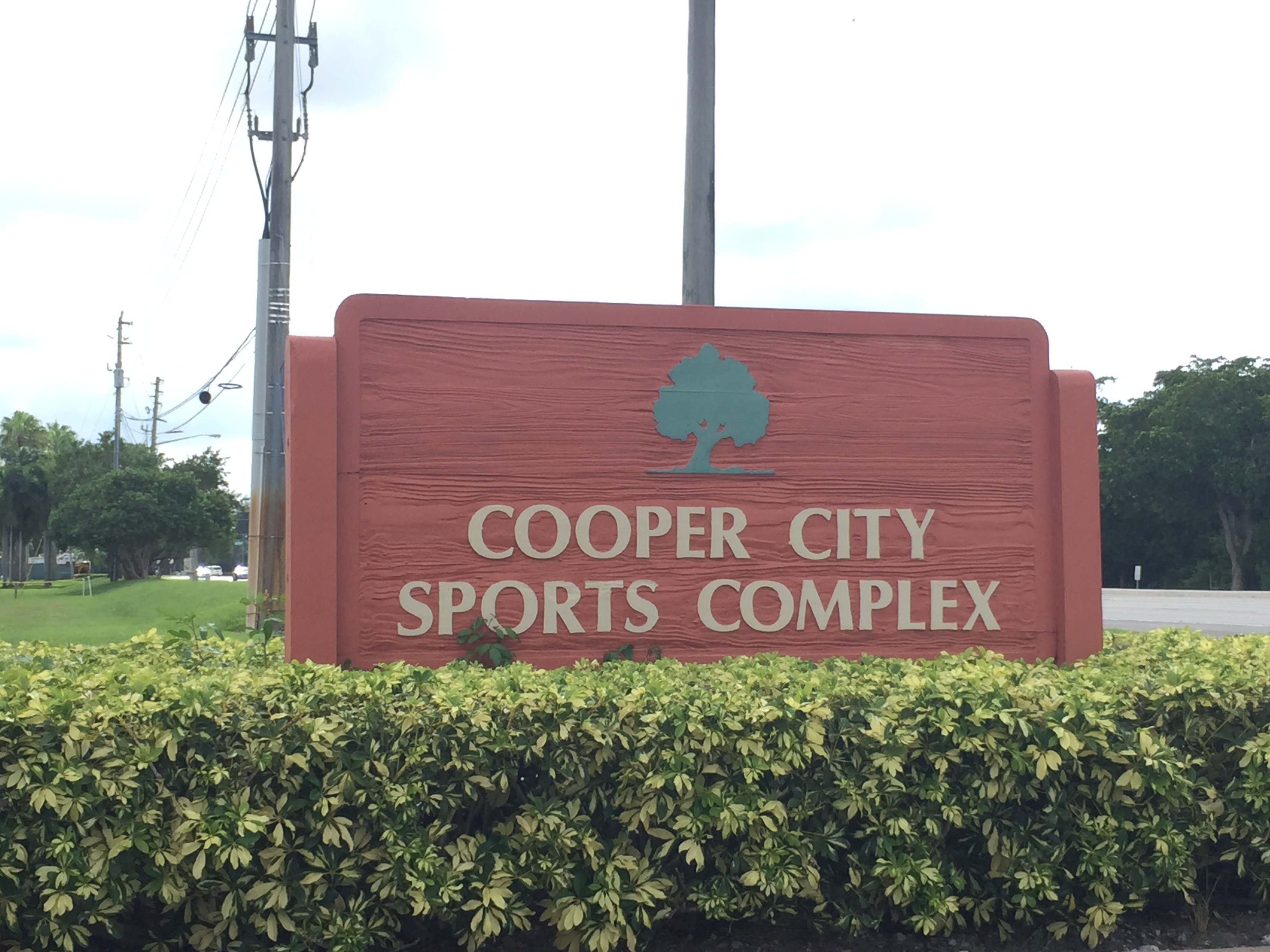 Sport Complex in Cooper City, Florida